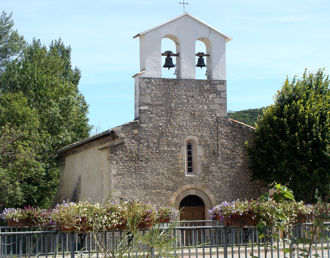 Façade de léglise d'Aspremont (Hautes-Alpes). Noter le mur-clocher, doublement ajouré.